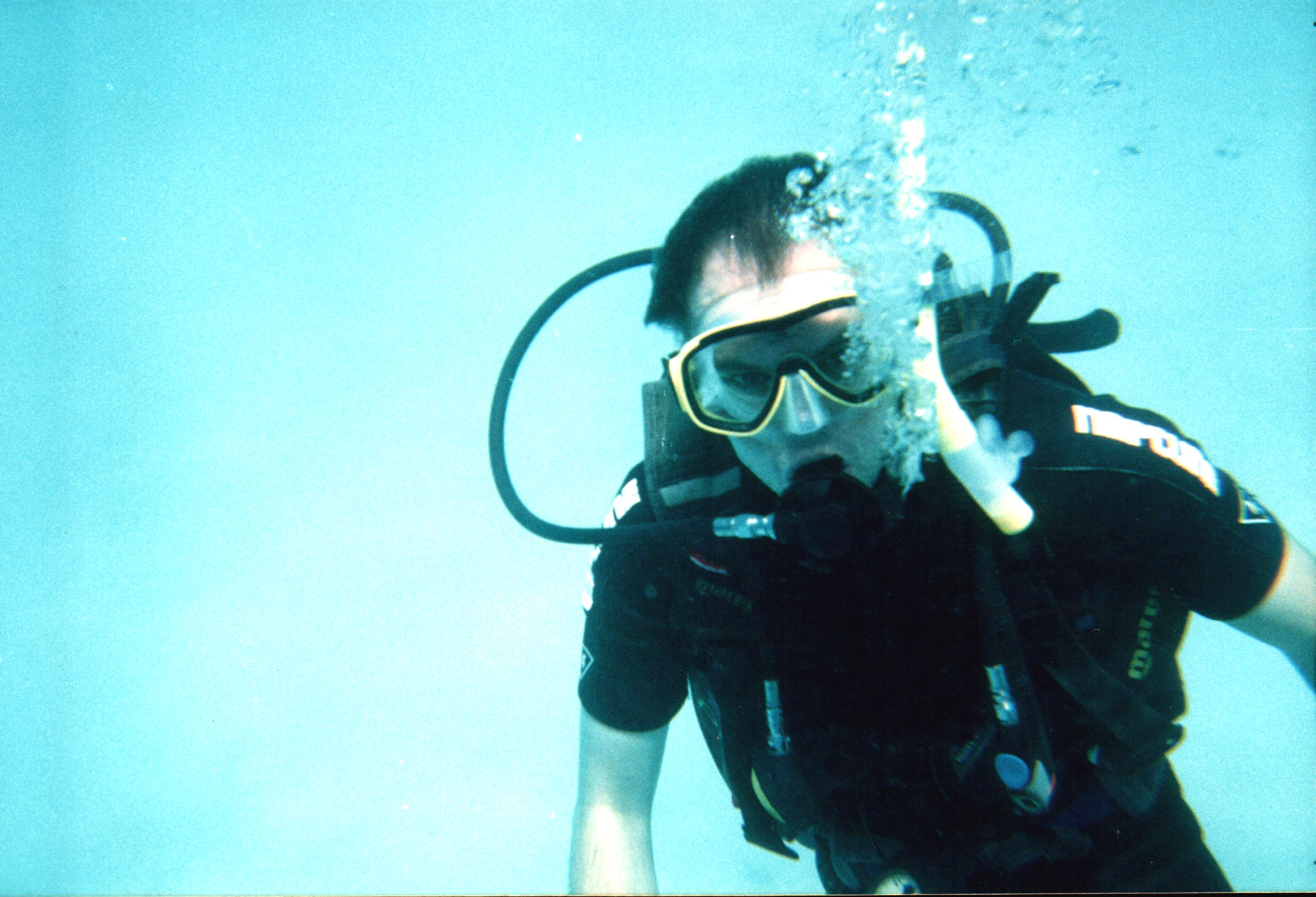 Tauchen am Great Barrier Reef